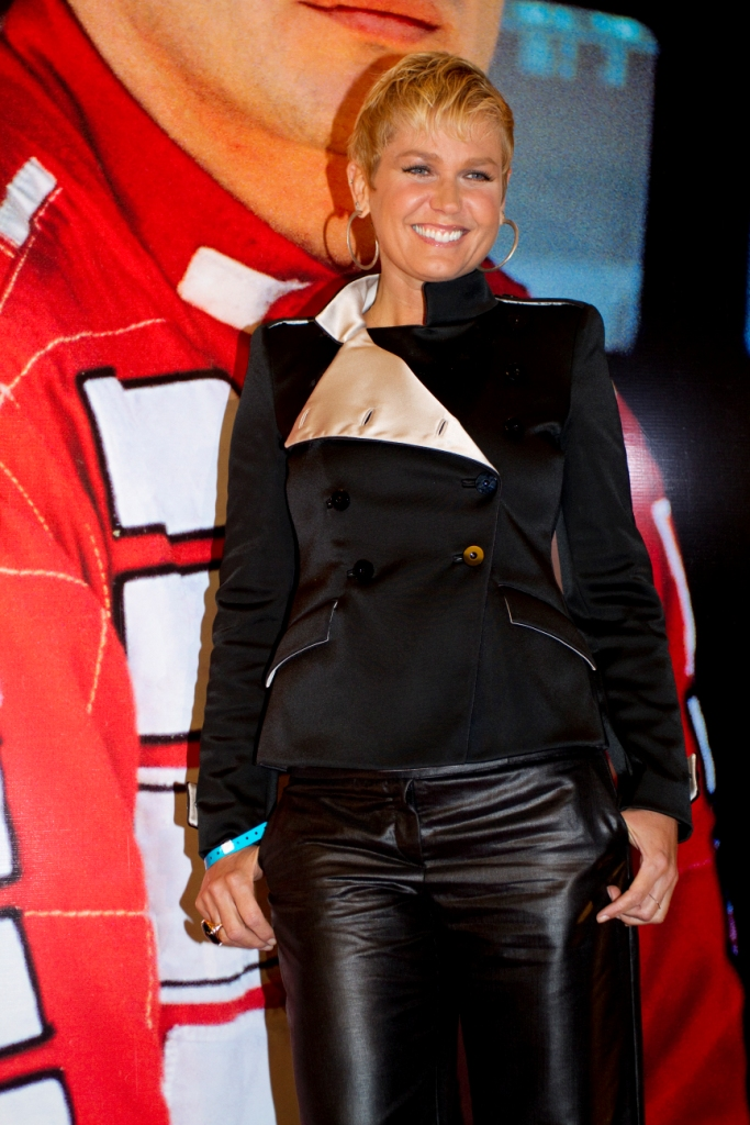 Xuxa em premie do filme Senna, 2009